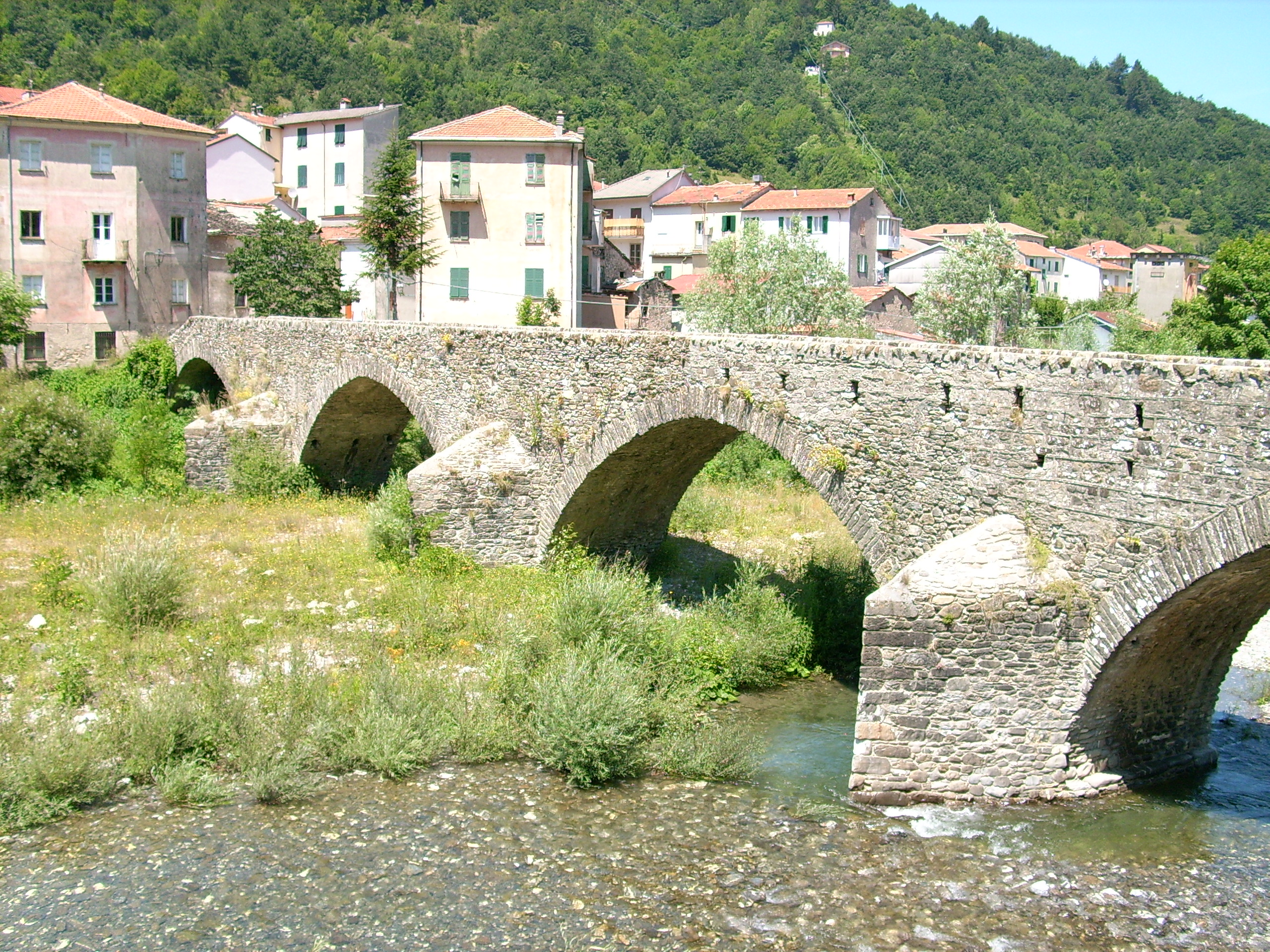 Ponte Doria presso Montebruno, Liguria, Italia